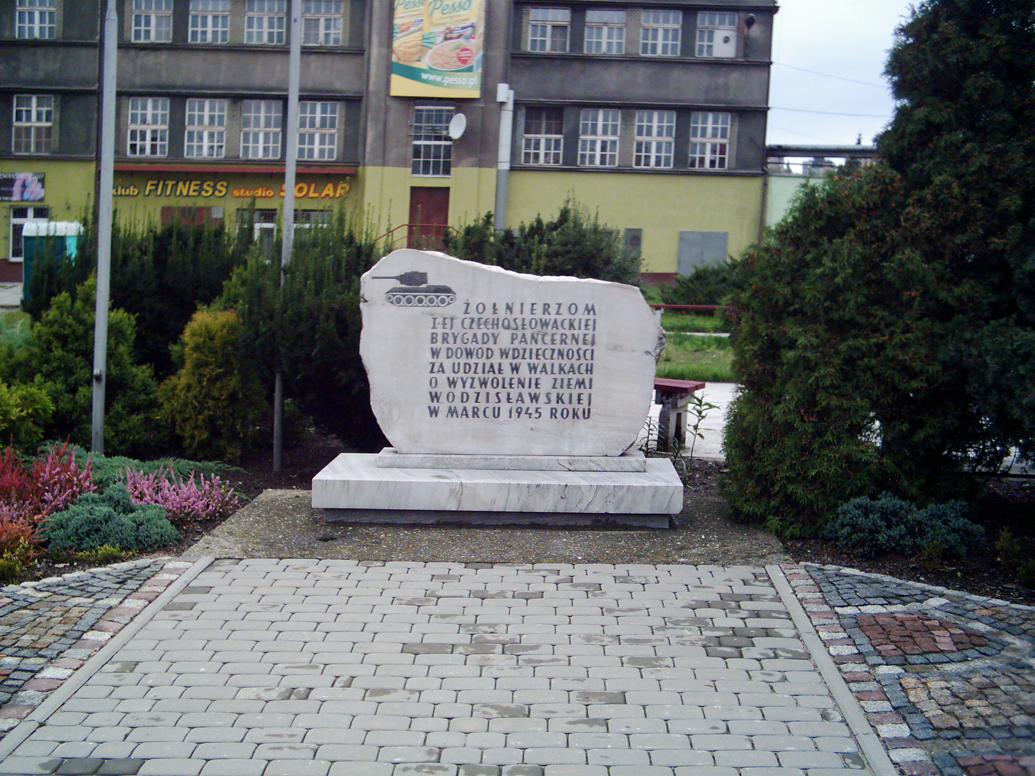 Wodzisław Śląski - Pomnik ku czci żołnierzy I Brygady Pancernej Armii Czechosłowackiej .